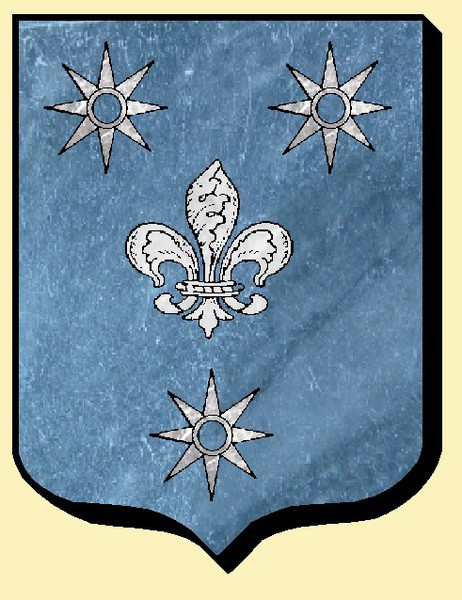 Balson familiale des Mouësan